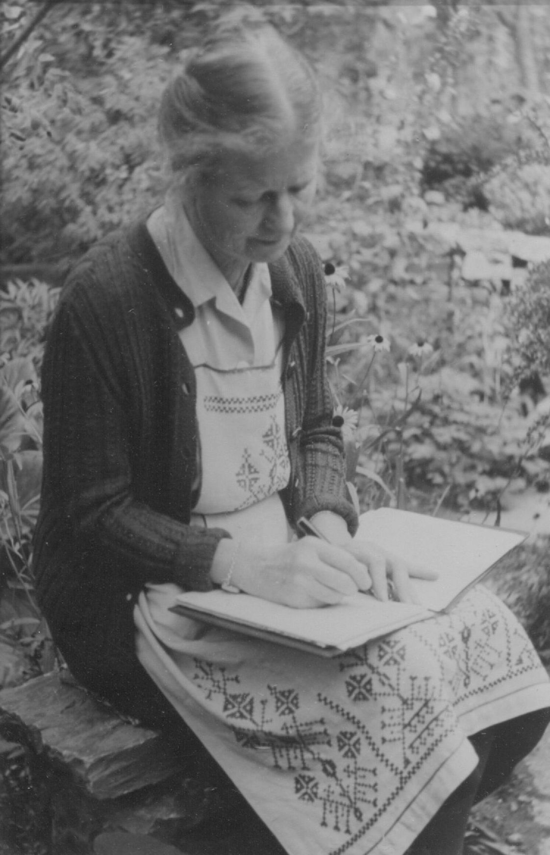 Elisabeth Müller (1885-1977), Schweizer Schriftstellerin